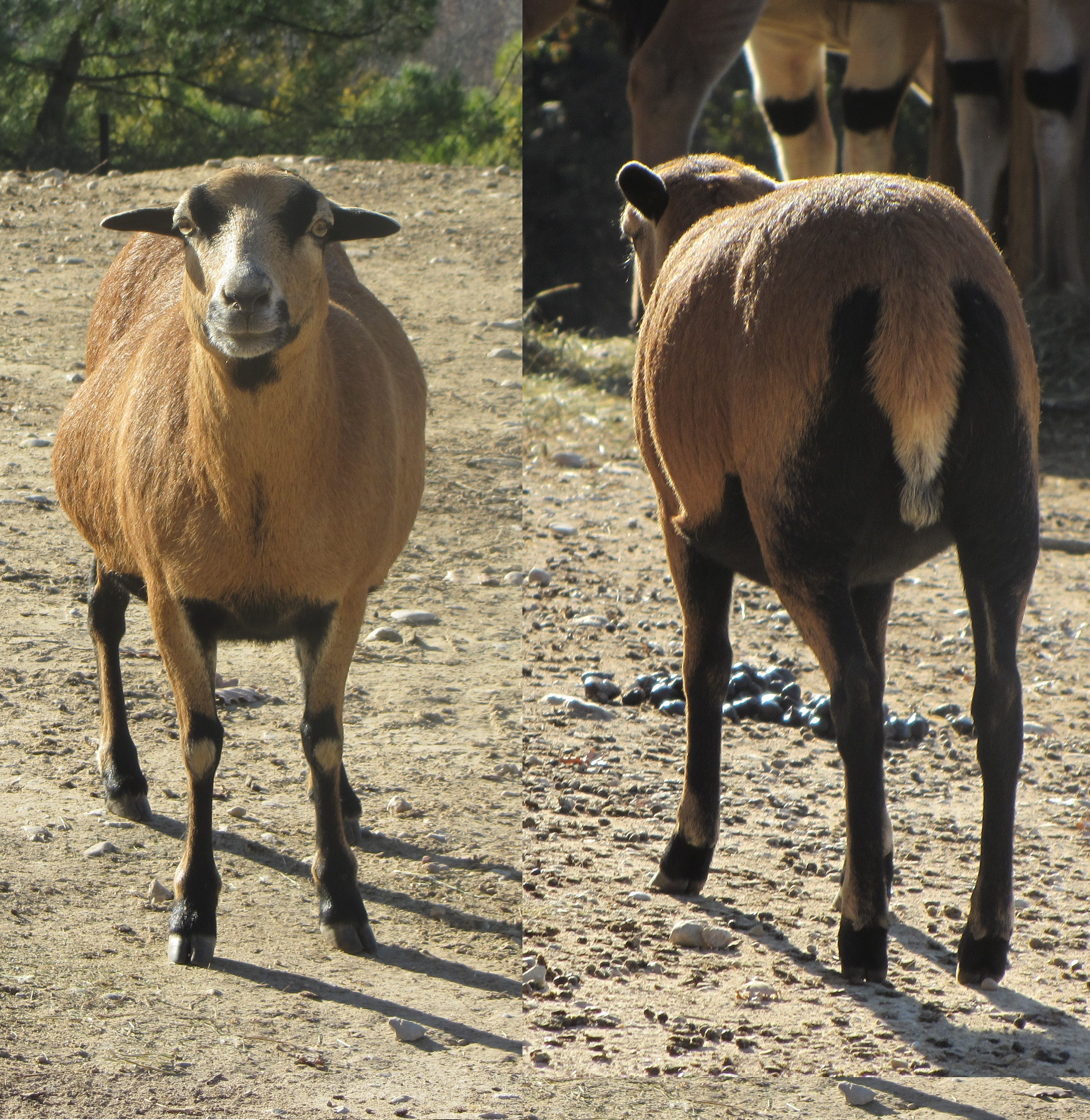 animale non ben definito al Parco Natura Viva di Verona